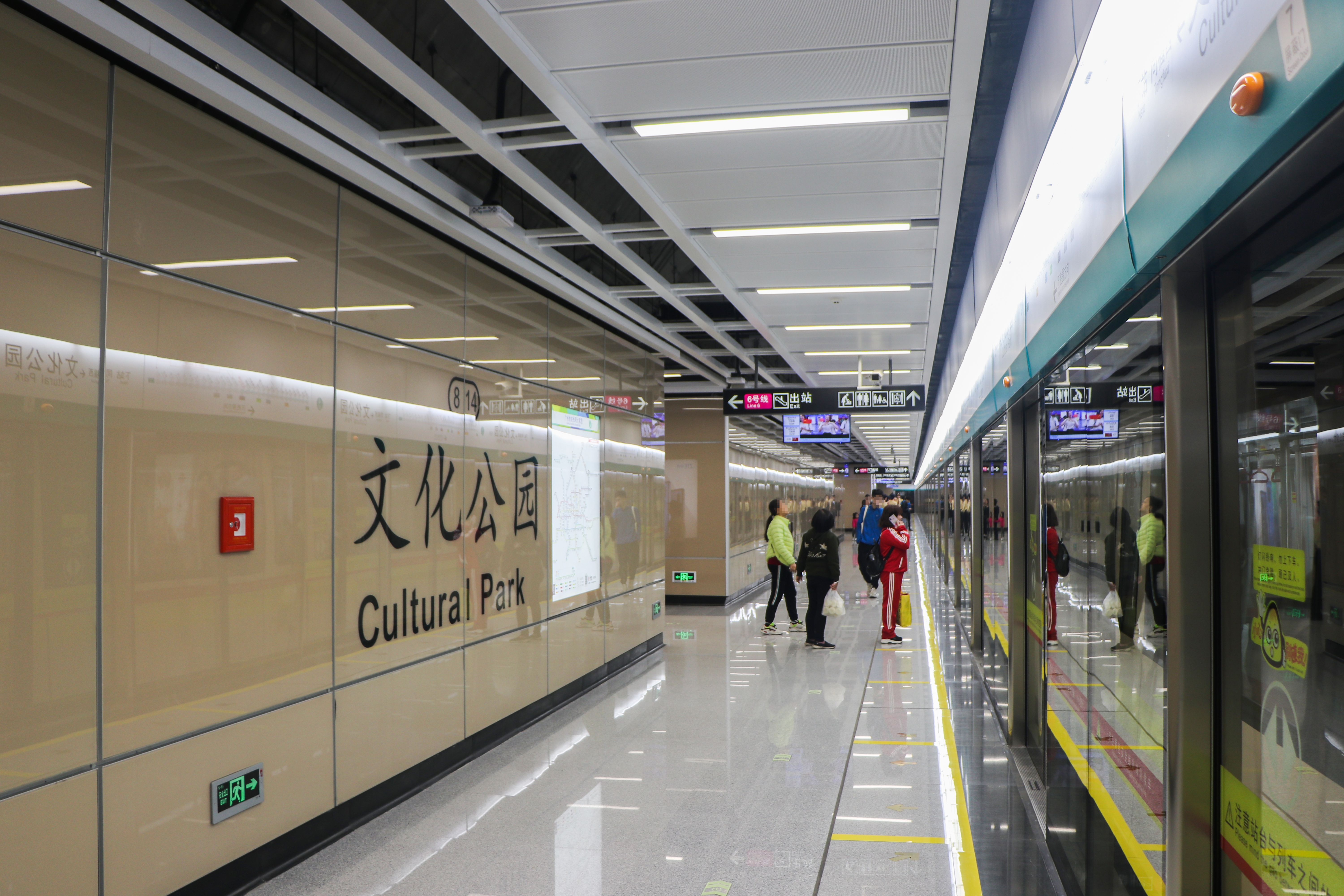 广州地铁文化公园站